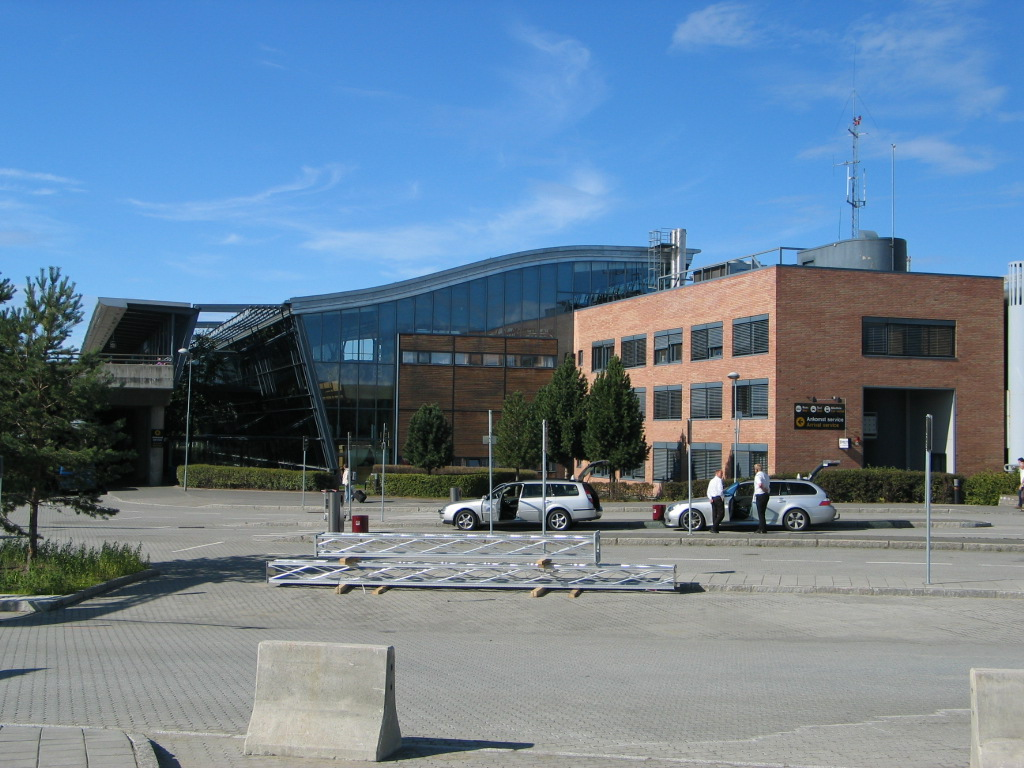 Trondheim Airport, Værnes